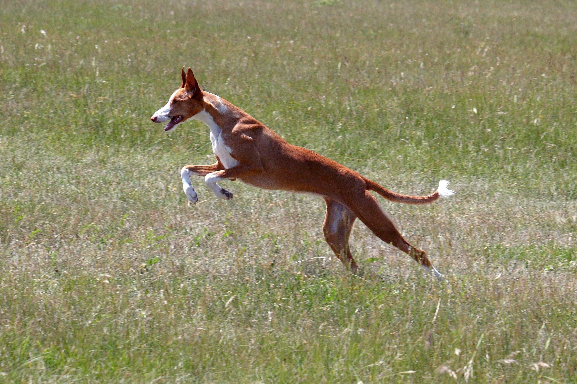 Bibi Back To Innocence, 1 an